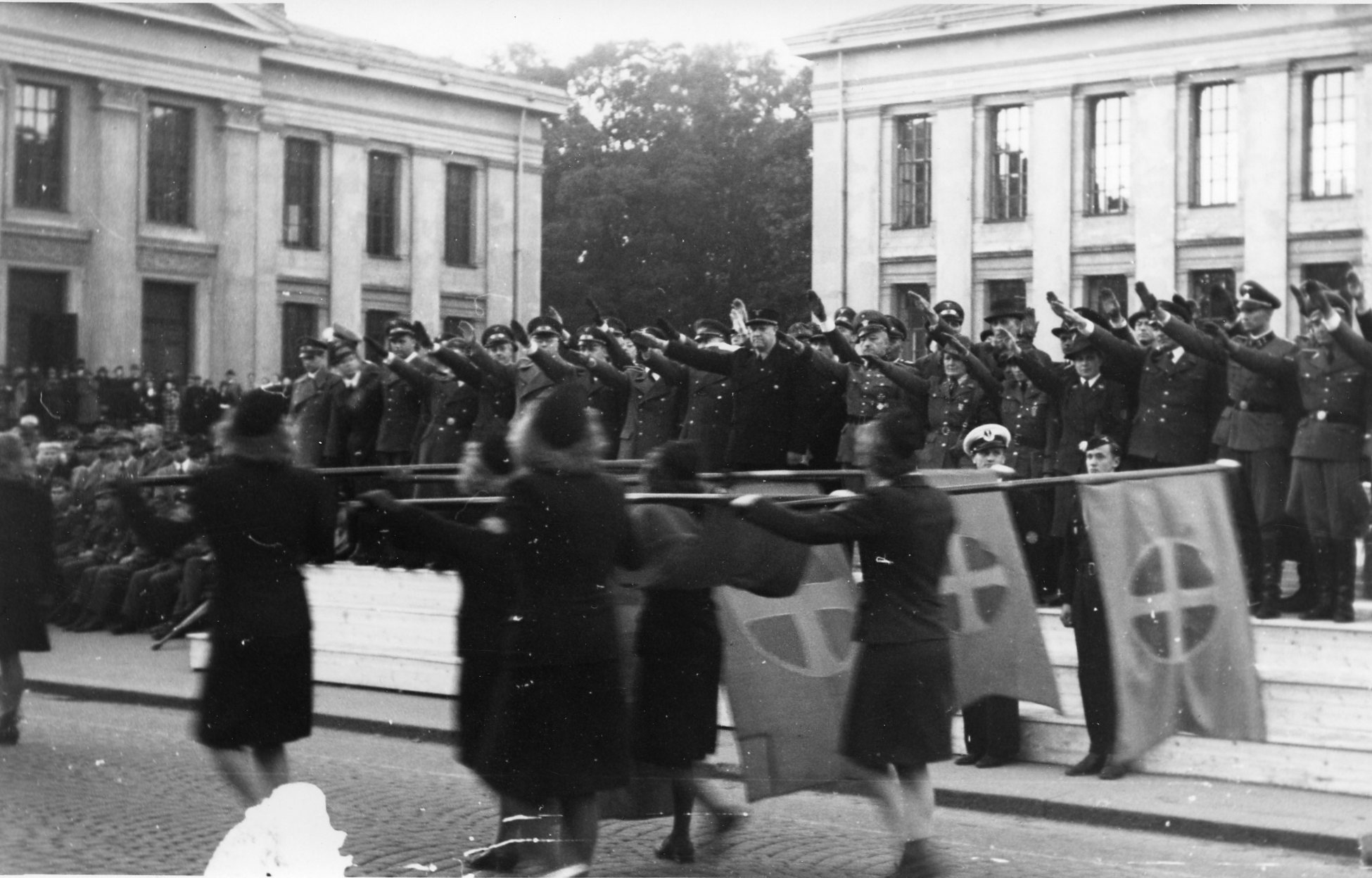 1942/09/25-27. RA/RAFA-3309/U 41A/6 /41-6-16 img325